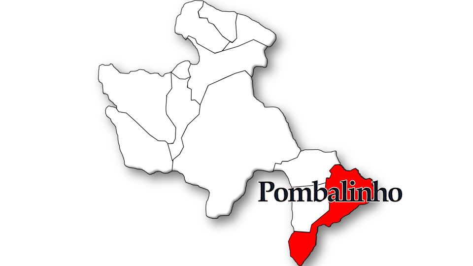 População